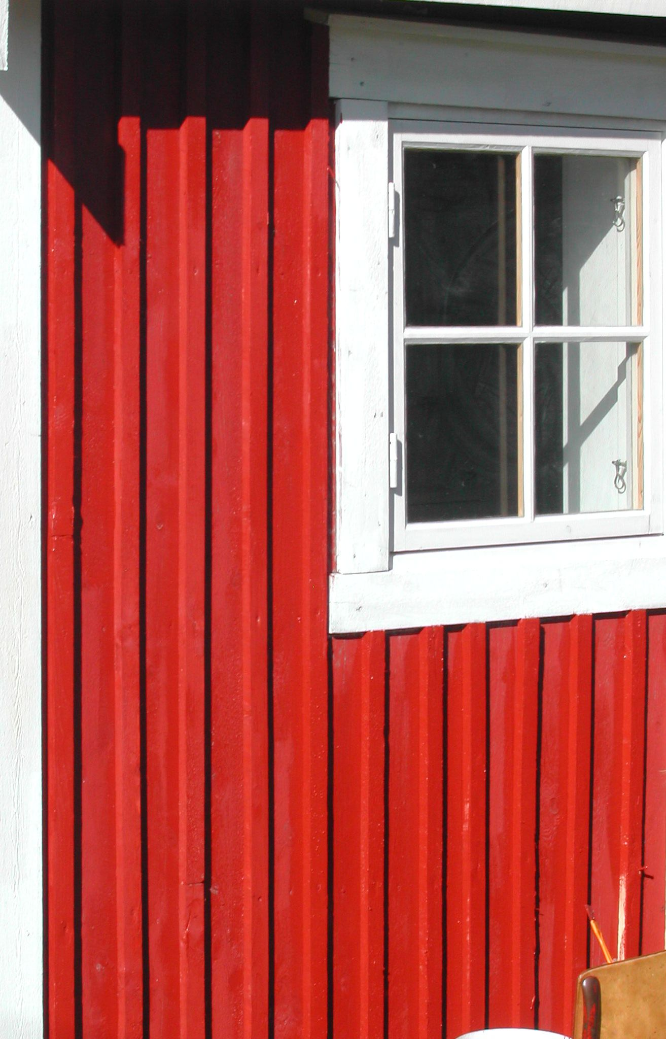 lektpanel av 95 mm bordkleding med 19x36 mm lekter over revene